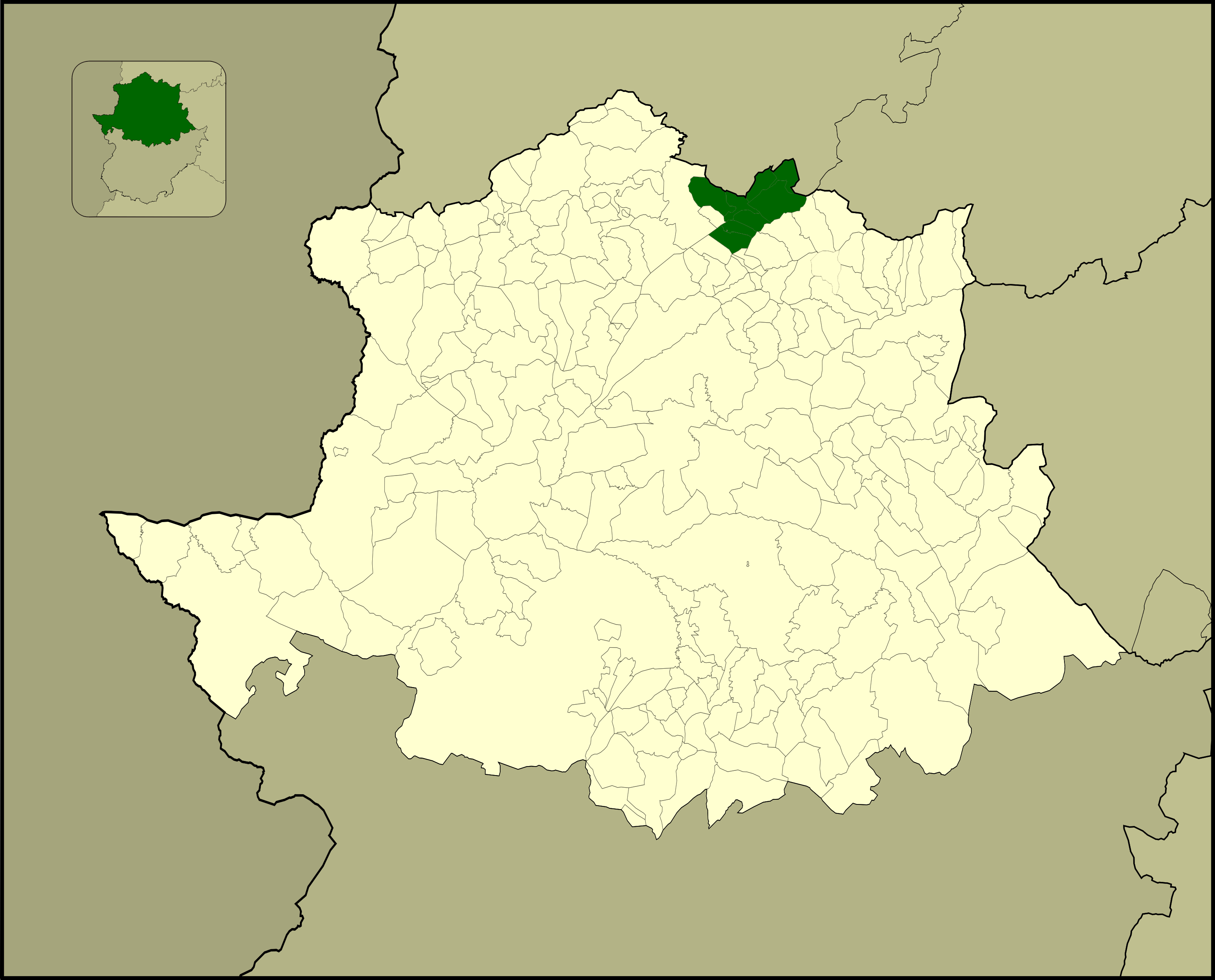 Situación de la comarca del Valle del Ambroz